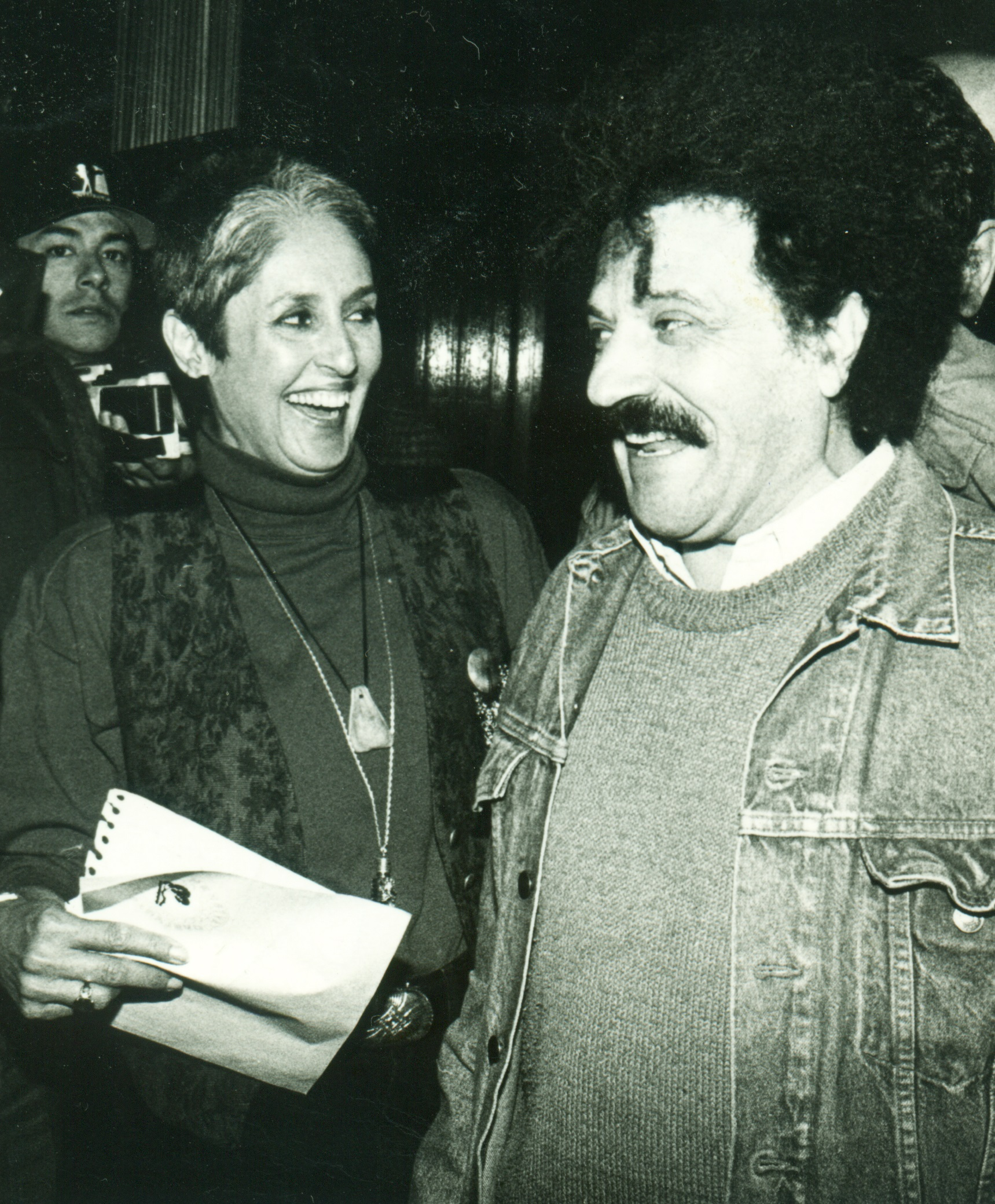 Želimir Altarac Čičak i Joan Baez prije njenog koncertnog nastupa u ratnom Sarajevu 14. aprila 1993. godine.